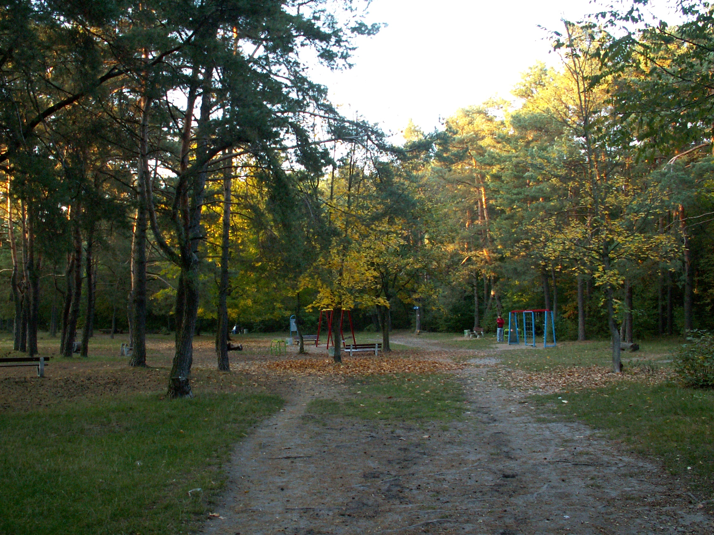 Stadion Leśny w Kielcach